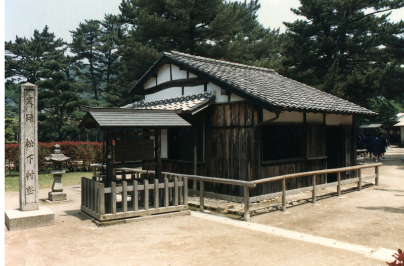 松下村塾(1990年5月 MASA撮影)